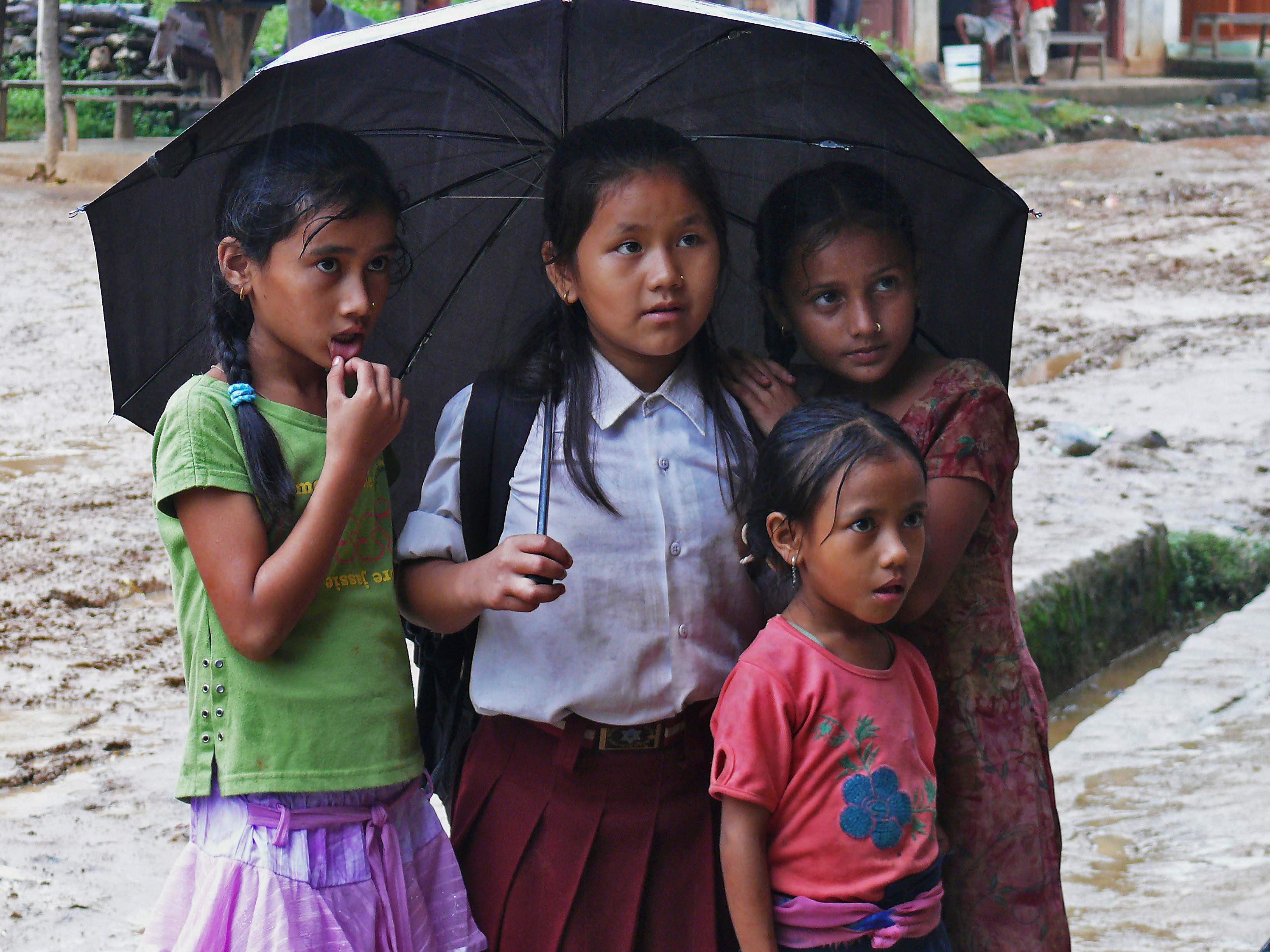 Nepalesische Mädchen im Monsun